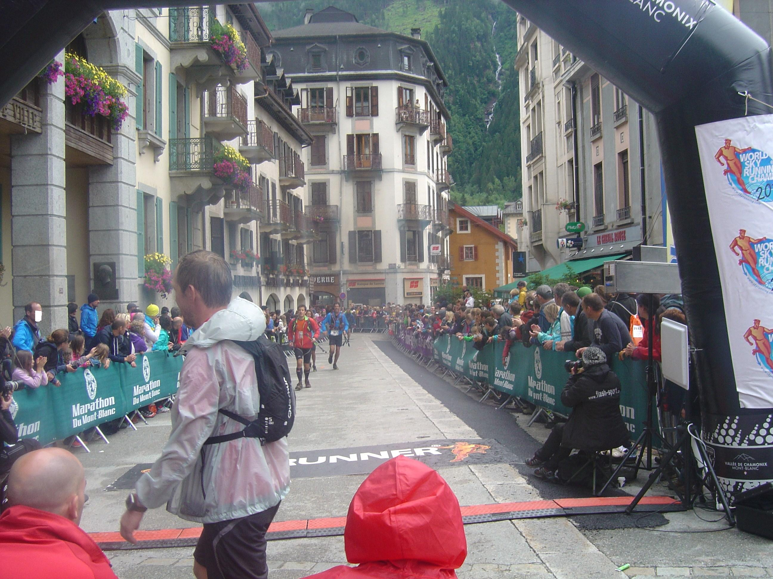 Arrivée à Chamonix sur le marathon du Mont Blanc 2014, alors que l'arrivée aux télécabines de Planpraz avait été annulée à cause de la pluie